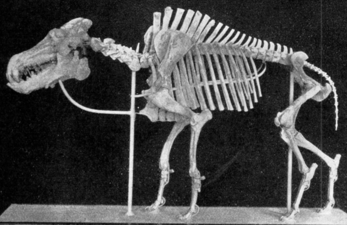 Daeodon hollandi skeleton.